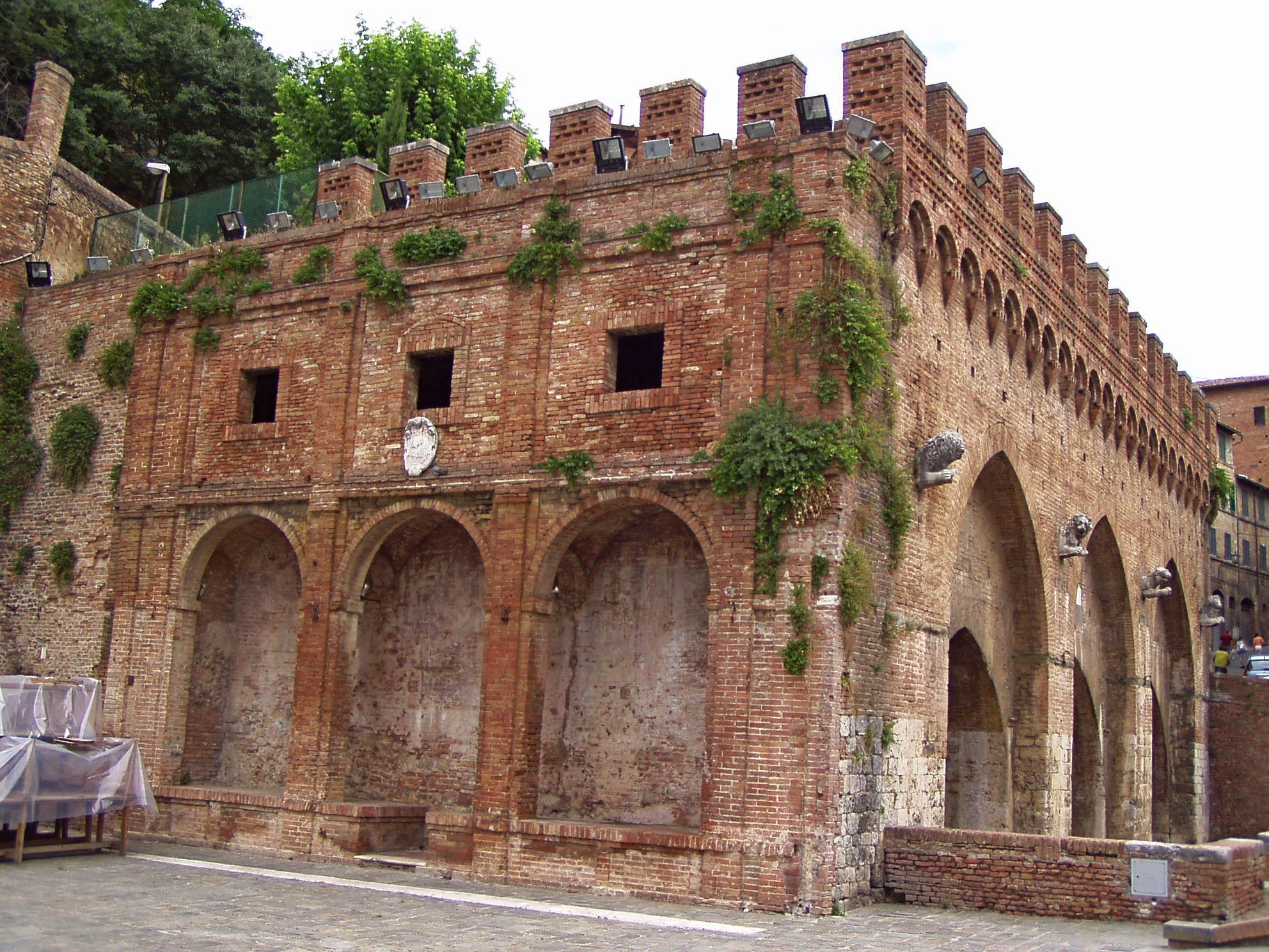 Siena, Fontebranda